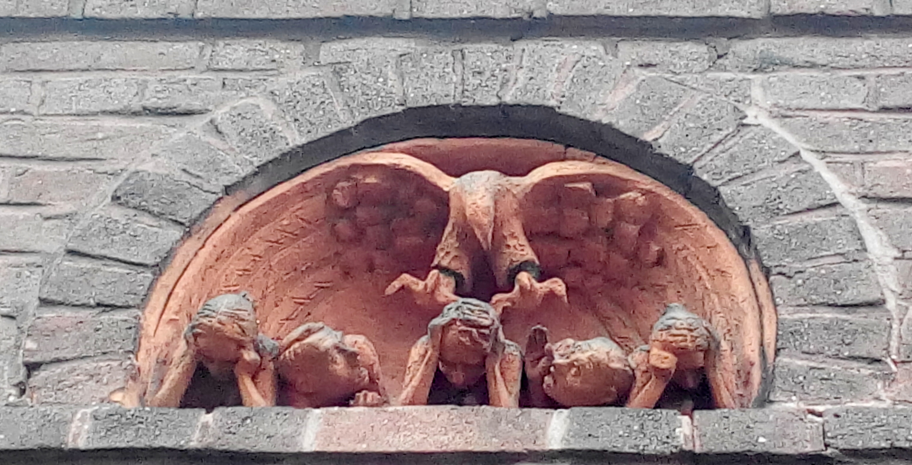 Gebäude Schulstrasse, Mittelteil, Plastik von Anton van Eyk (Vergrösserung - Hitler-Allegorie)